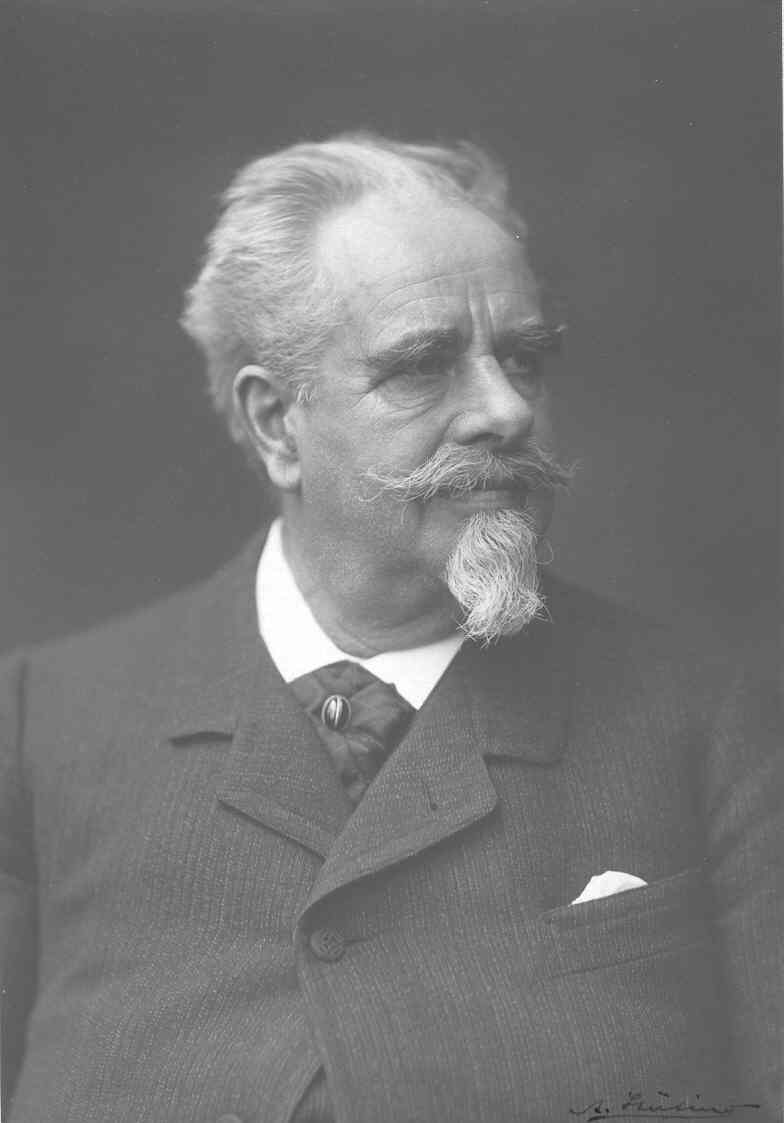 Porträtfotografie von Adolph von La Valette-St. George